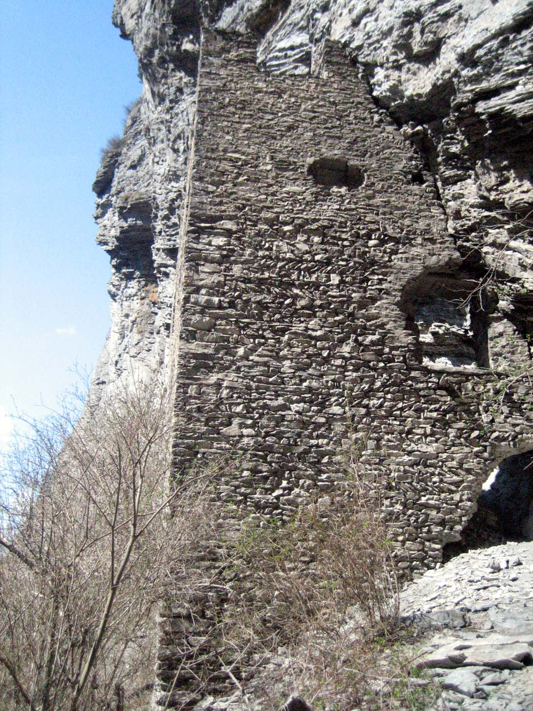 Fracstein Südseite